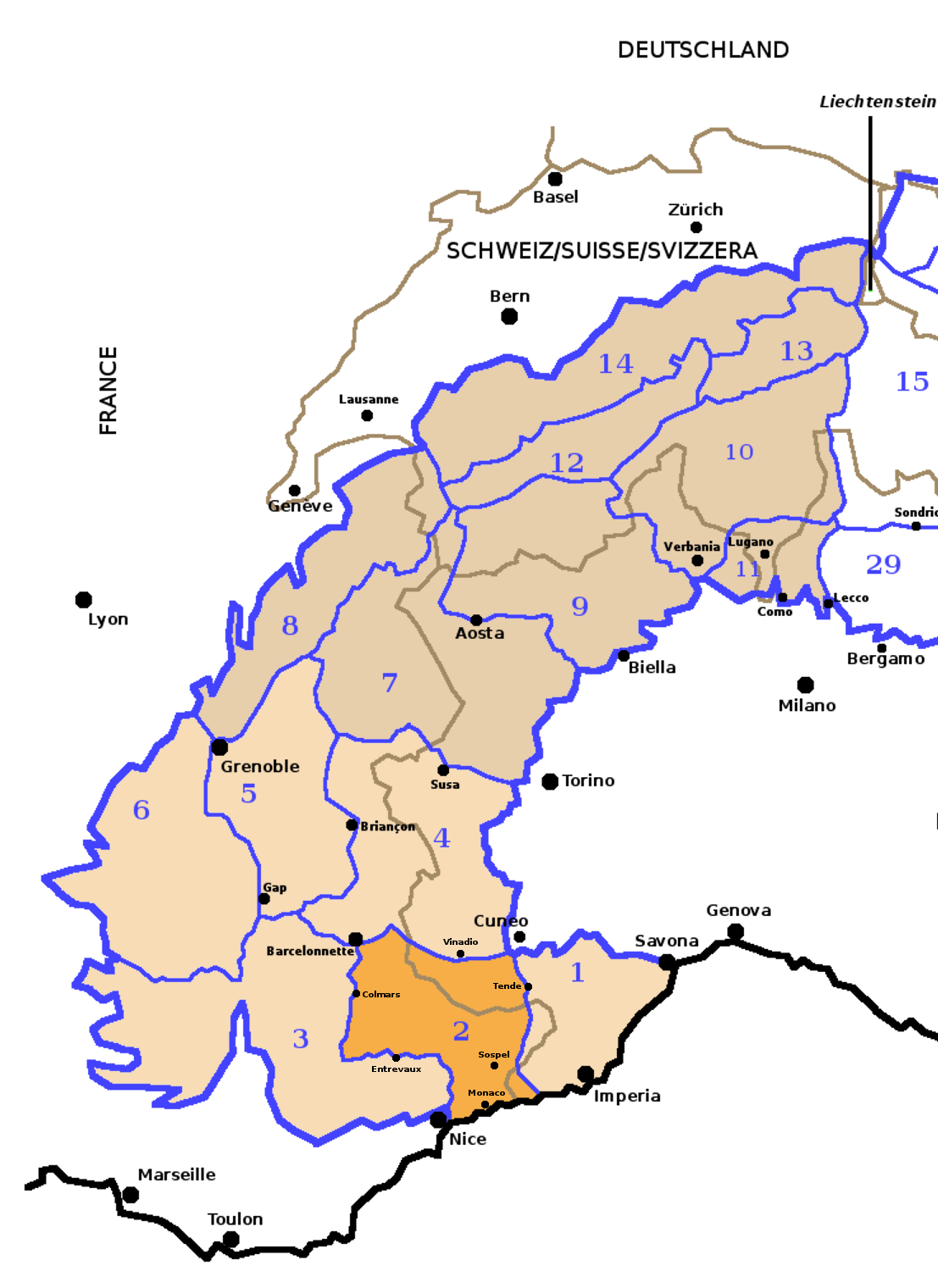 Schema delle Alpi Occidentali secondo la SOIUSA con evidenziata la dislocazione della sezione 2 - Alpi Marittime e Prealpi di Nizza